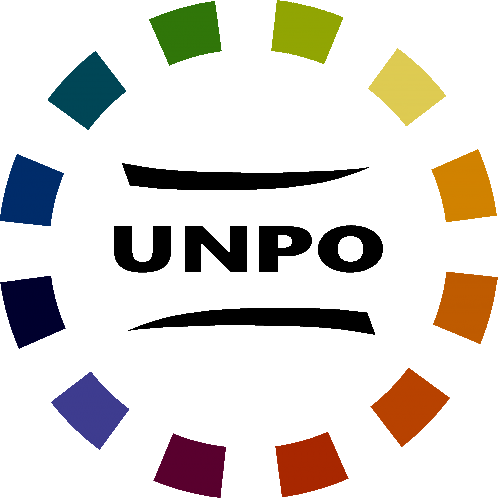 UNPO標誌